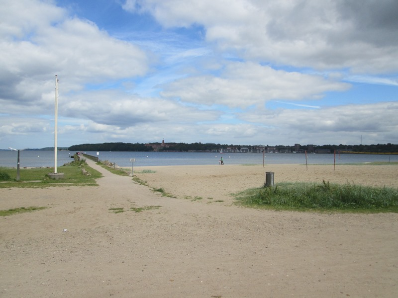 Østersøbadet Flensborg